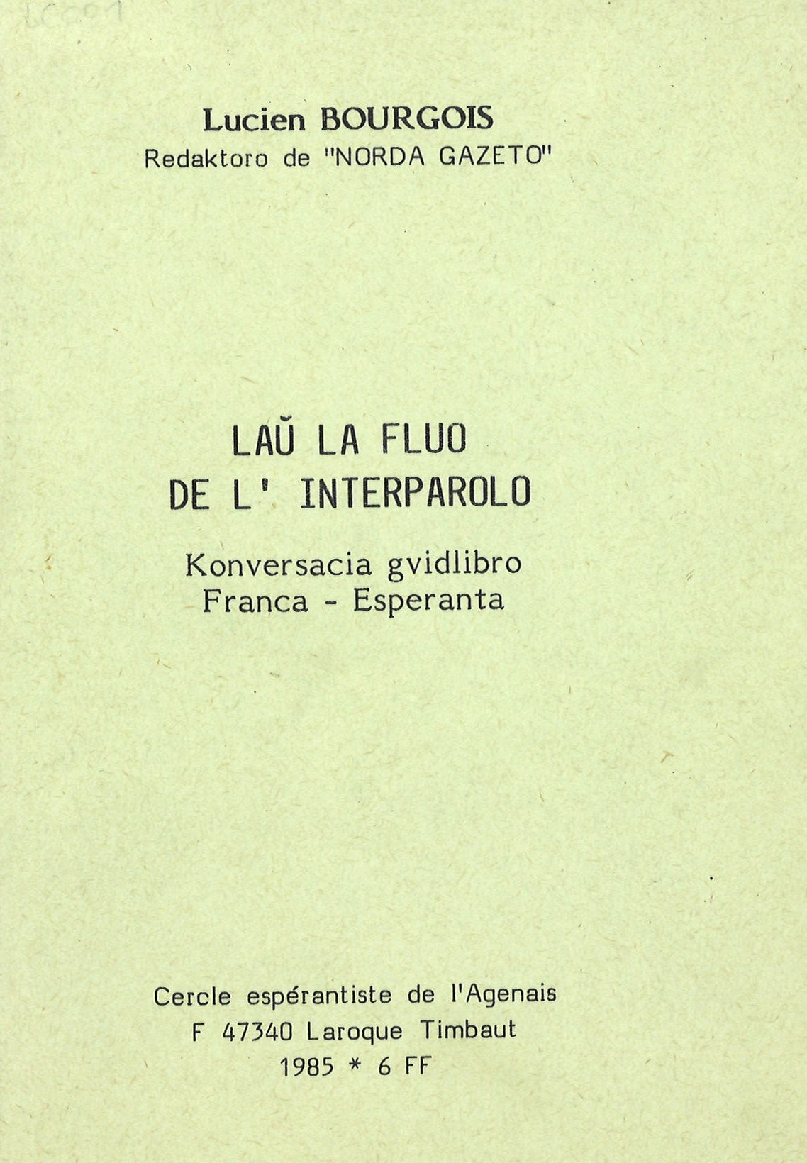 librokovrilo de "Laŭ la Fluo de l' Interparolo", 1985